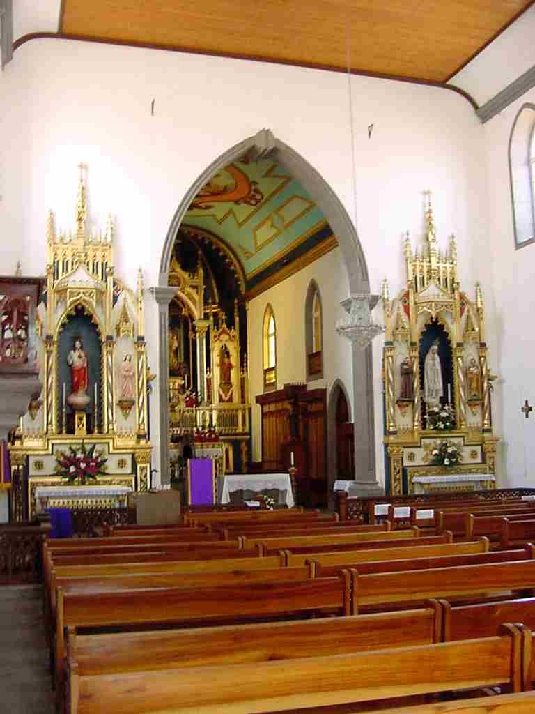 Igreja da Agualva, nave central , Agualva, ilha Terceira, Açores, Portugal